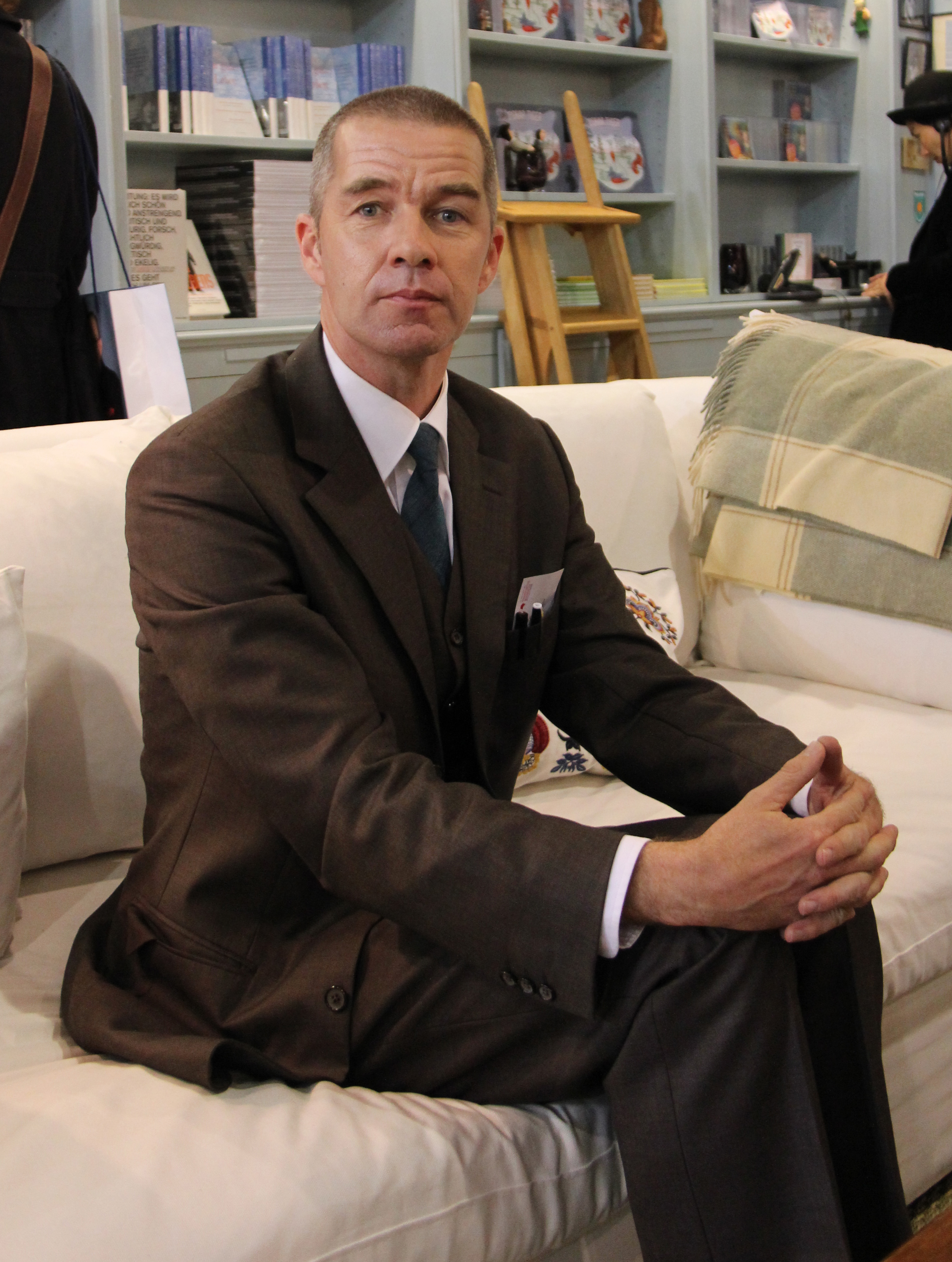 Ursus Wehrli auf der Frankfurter Buchmesse 2011